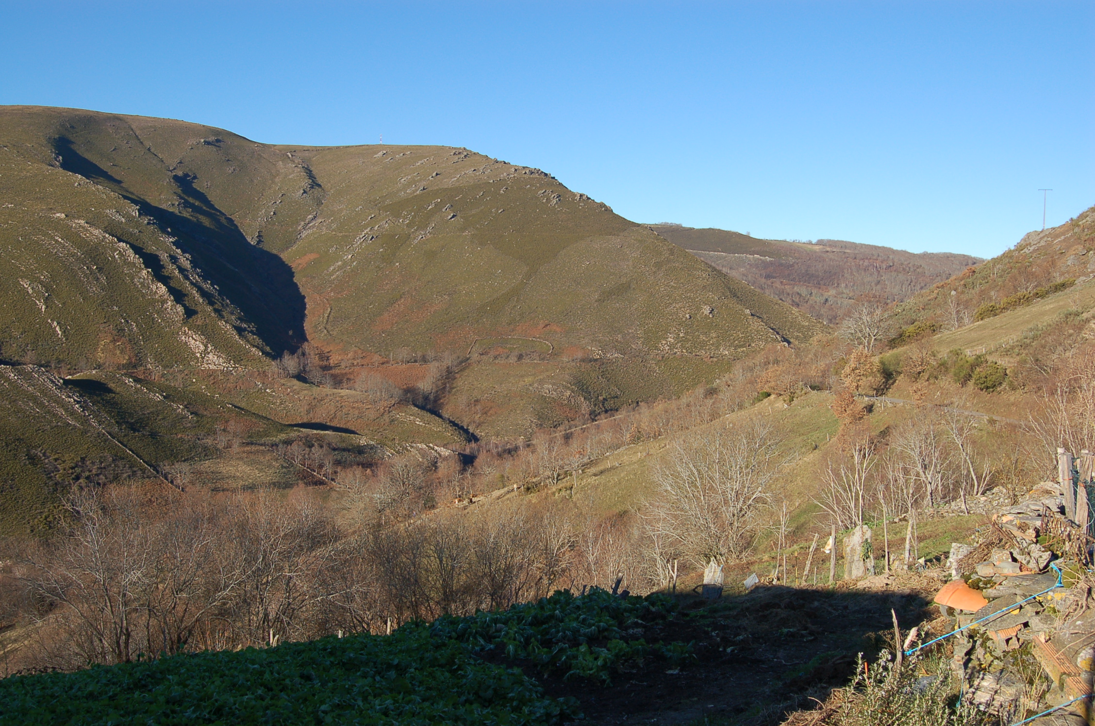 Val do río Navea desde As Taboazas